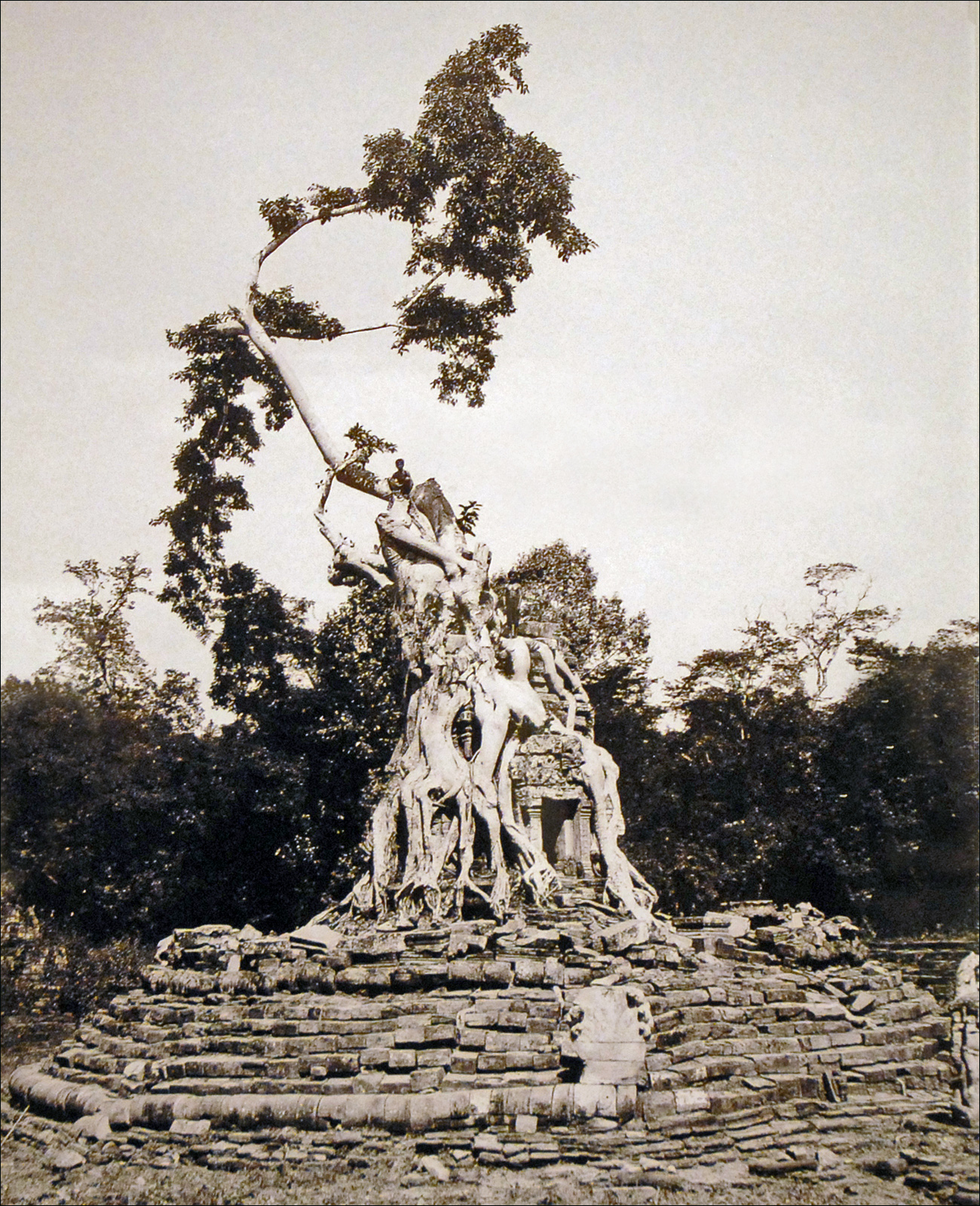 Neak Pean après la tempête qui emporta la branche maîtresse de l'arbre (Ficus / Banyan) qui l'enserrait totalement. .Archives photographiques de l'EFEO Septembre 1936 Neak Pean est constitué d'un ensemble de bassins (baray) disposés en forme de croix avec au centre une tour sanctuaire (les Naga enroulés). Il est dans l'axe du temple Preah Khan.Il mesure 3500 m sur 900. Construit sous Jayavarman VII, il date de la fin du XIIème siècle. Chaque bassin extérieur est relié au bassin central par une chapelle d'ablutions dont les gargouilles sont en forme de tête humaine, de tête de cheval, de tête d'éléphant, de tête de lion. Dans le grand bassin, se dresse le cheval volant Bâlaha, une métamorphose du Bodhisattva-Lokeshvara pour sauver les "naufragés de l'île habitée par les ogresses". La représentation symbolique de cet ensemble monumental pourrait être le lac bouddhique Anavatapta de l'Hymalaya, aux eaux guérisseuses, où se baignaient les Bouddha et les Arhat. Le centre serait la source des quatre grands fleuves de l'Inde représentés par les quatre petits bassins. Voir le Neak Pean aujourd'hui ________________________________________________________________ Le musée Cernuschi propose du 10 septembre au 2 janvier 2011 une exposition "Archéologues à Angkor" consacrée à l'action centenaire de l'École Française d'Extrême-Orient à Angkor (Cambodge). Cette institution de recherche mène des actions depuis 1907 pour ressusciter le site d'Angkor, longtemps grande métropole d'Asie avant d'être envahie au XVIe siècle par la jungle... Le visiteur découvre dans l'exposition les différentes périodes qui ont marqué les fouilles et travaux d’Angkor à travers 108 photographies (1860-1960) des temples avant leur dégagement, alors que des arbres immenses enserrent sanctuaires et reliefs, puis durant et après leur restauration.